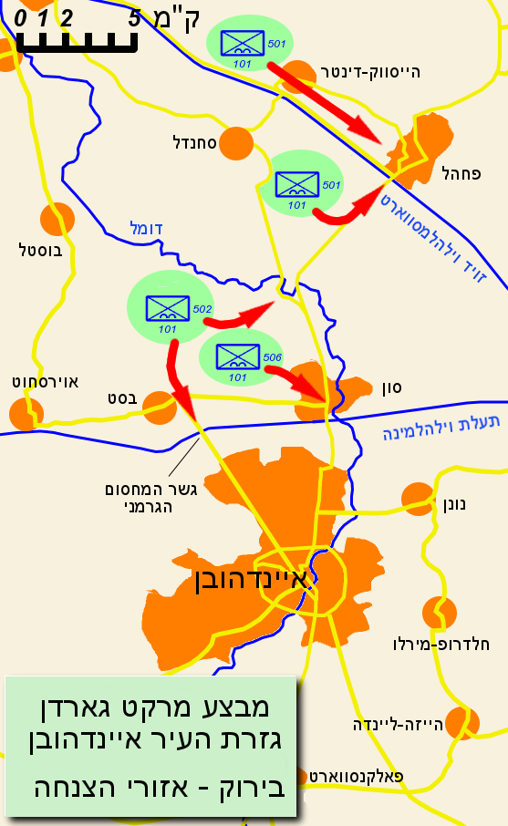 מבצע מרקט גארדן בגזרת העיר איינדהובן